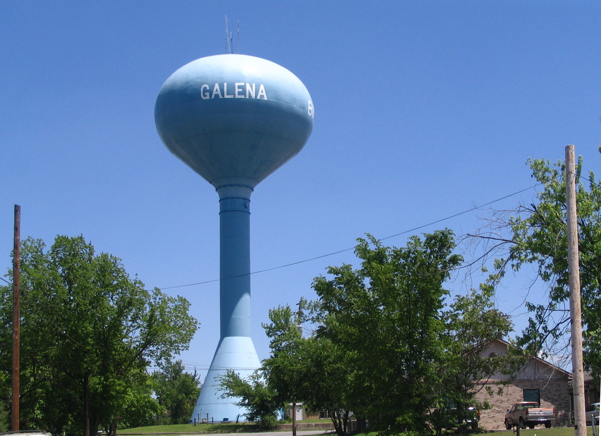 Water Tower in Galena